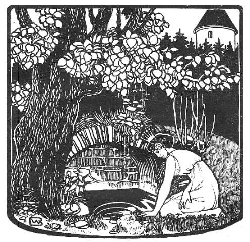 Die Königstocher sieht in den Brunnen. Szene aus dem Märchen Der Froschkönig oder der eiserne Heinrich (KHM 1) der Gebrüder Grimm.Illustration von Bernhard Wenig zu der Ausgabe in: Königskinder. 5 Märlein von Prinzen und Prinzessinnen und was ihnen wunderbares begegnet, Berlin (Fischer u. Franke) 1900(Selbst digitalisiert und bearbeitet. Urheberrecht des Originales abgelaufen: gemeinfrei)